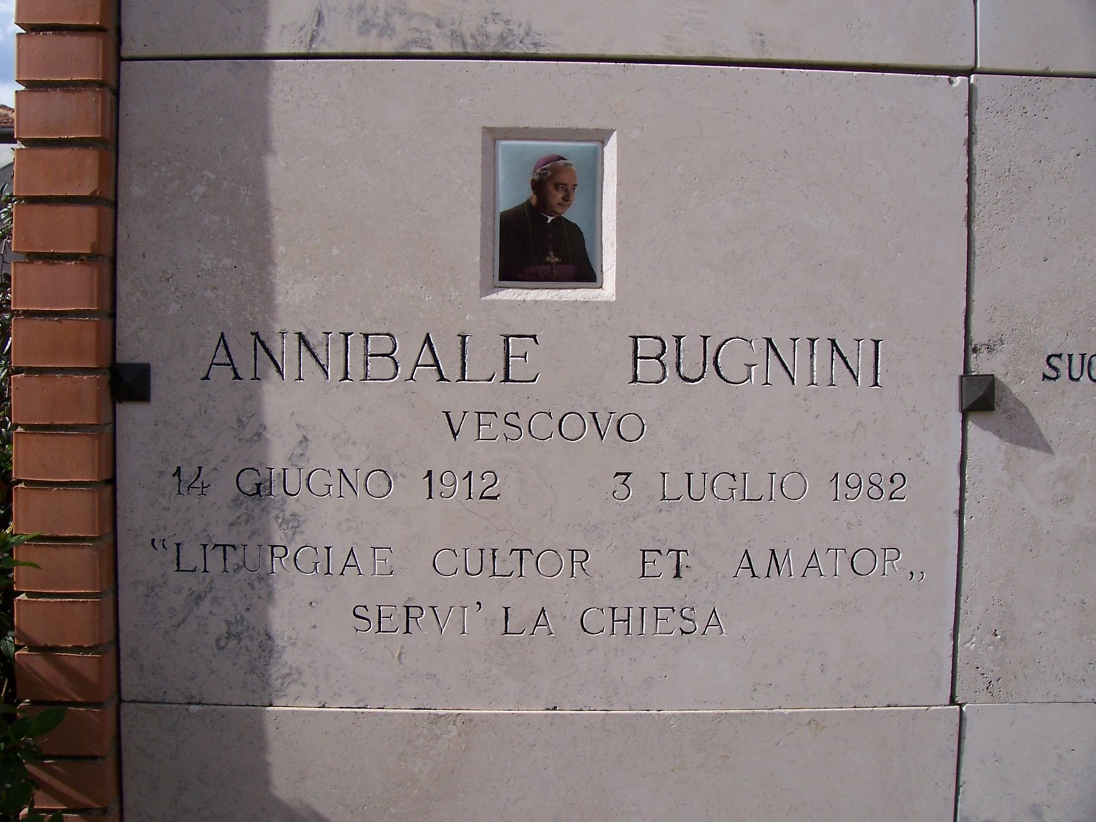 Tomba di Bugnini nel cimitero di Civitella del Lago, un tempo Civitella de' Pazzi, suo paese natale (TR)